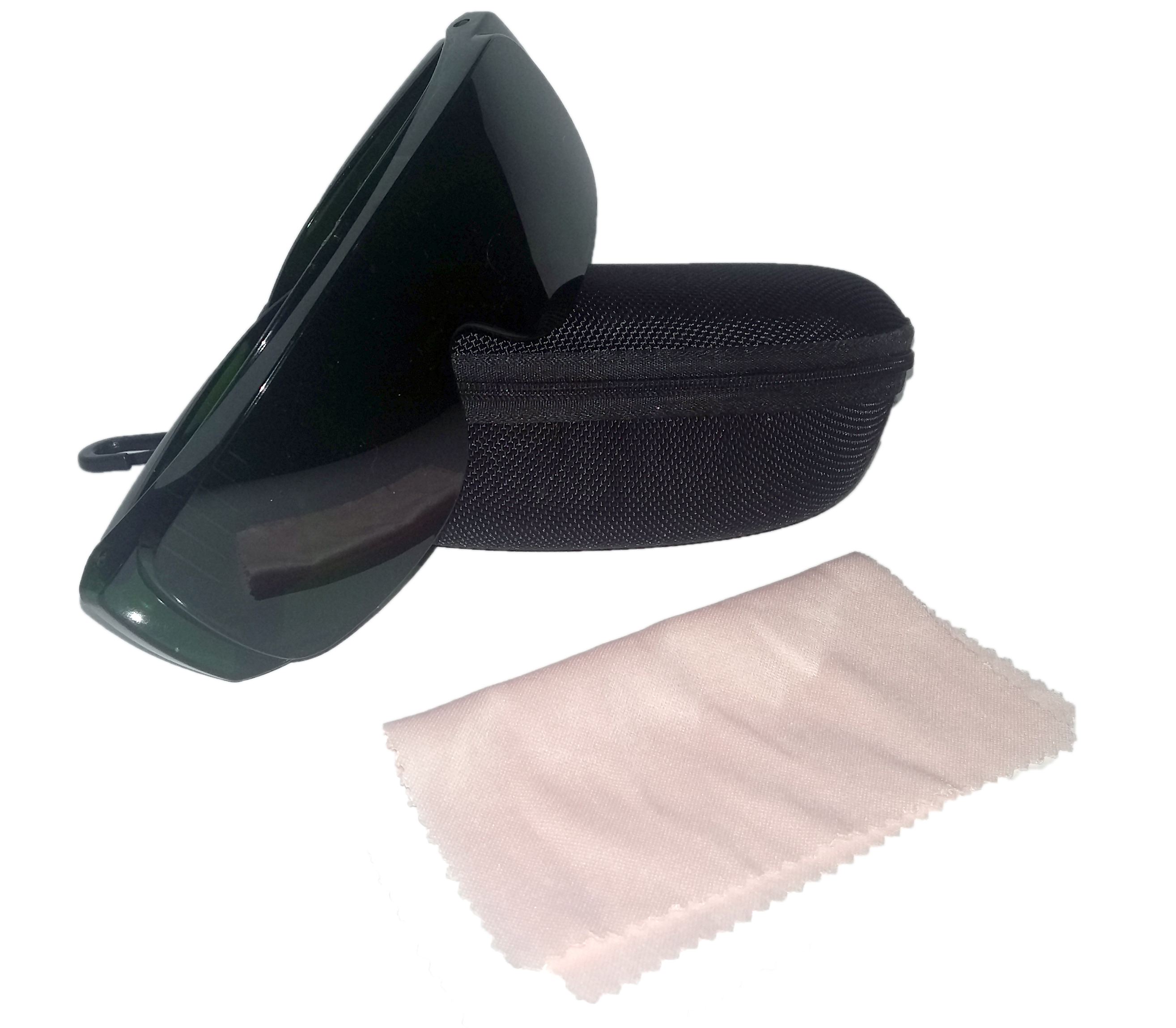 تجهیزات حافظت در برابر پرتو